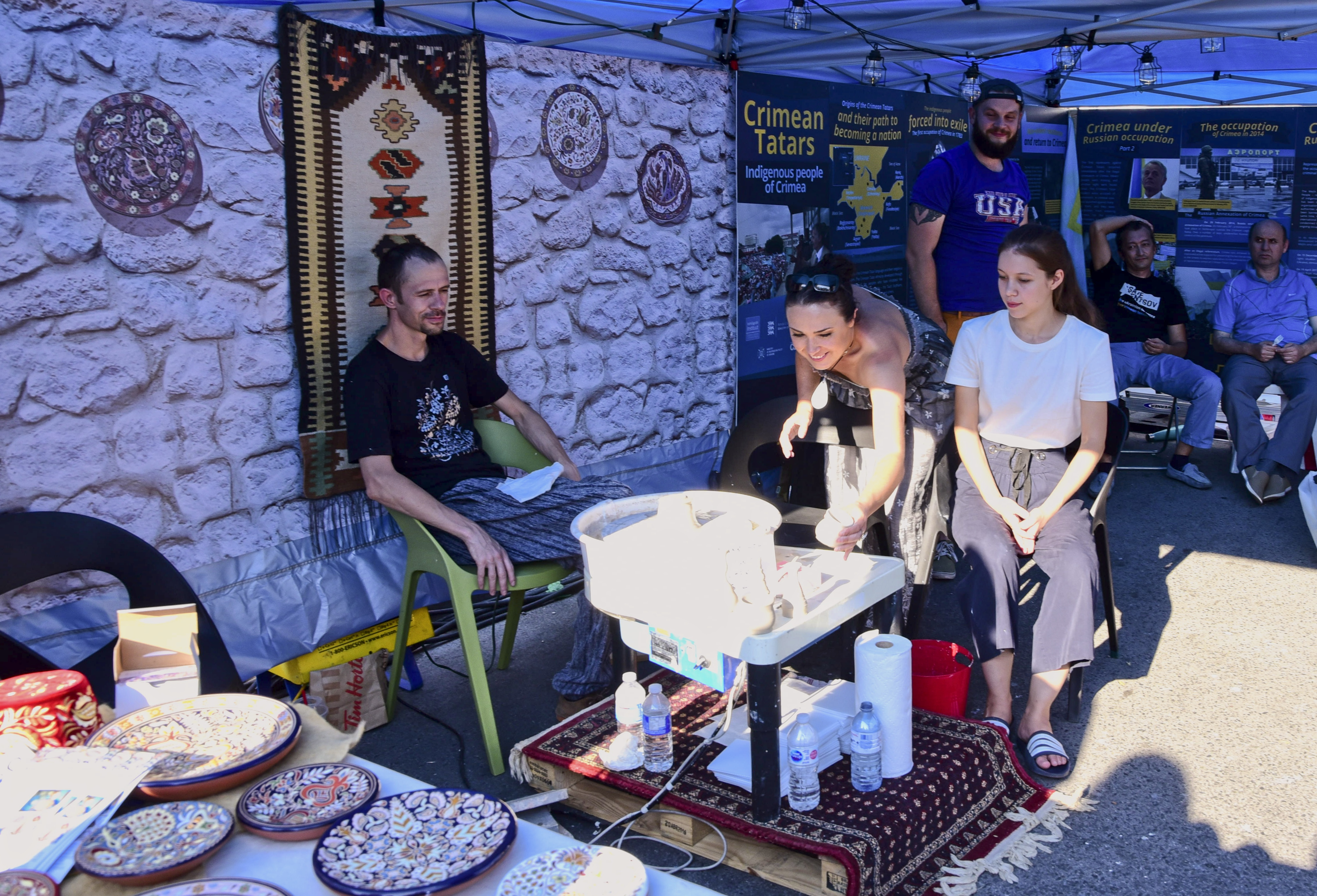 Кримськотатарський кераміст Рустем Скибін на Фестивалі Блюр Вест у Торонто 2018 демонструє виготовлення традиційних кримськотатарських керамічних виробів у кримському наметі